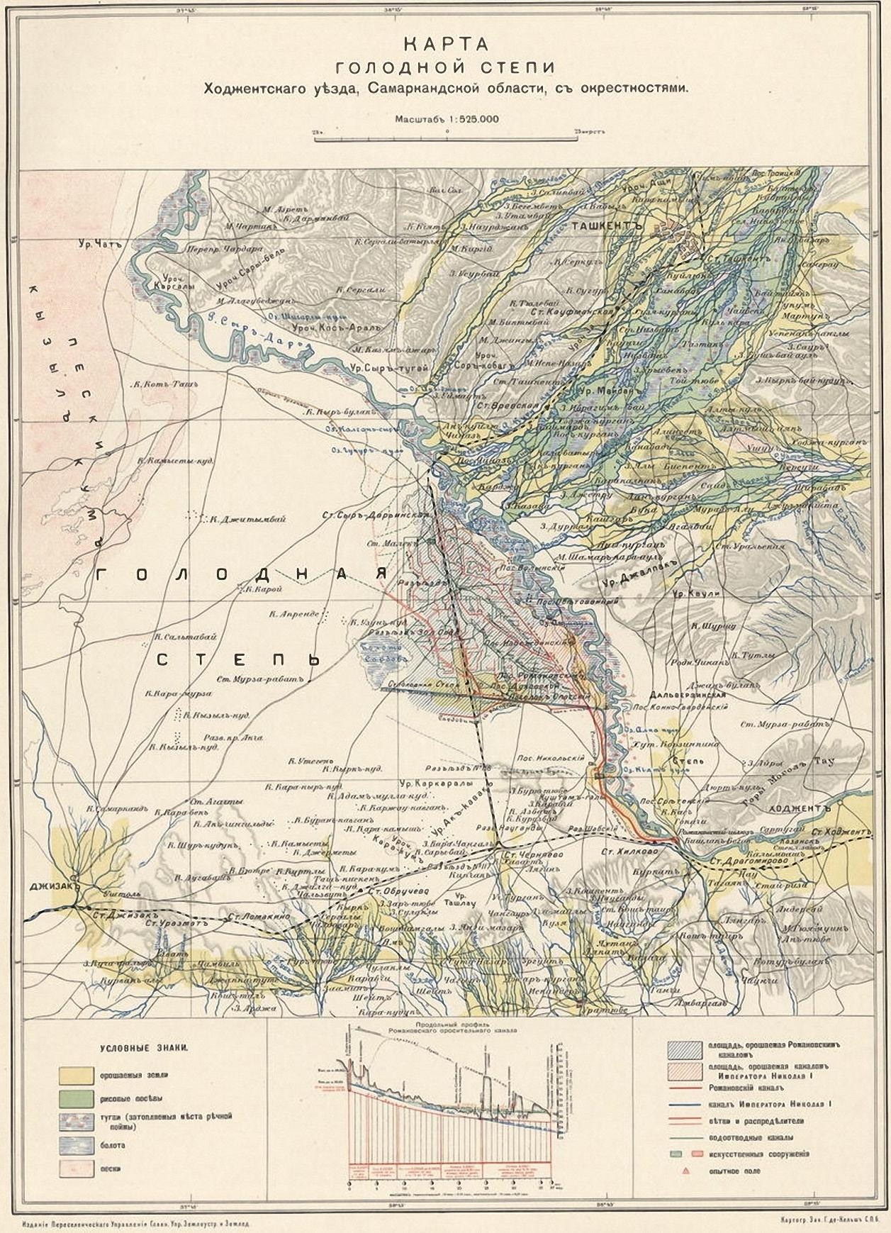 Карта Голодной степи на период до 1917 года (Copied over from Russian language Wikipedia)